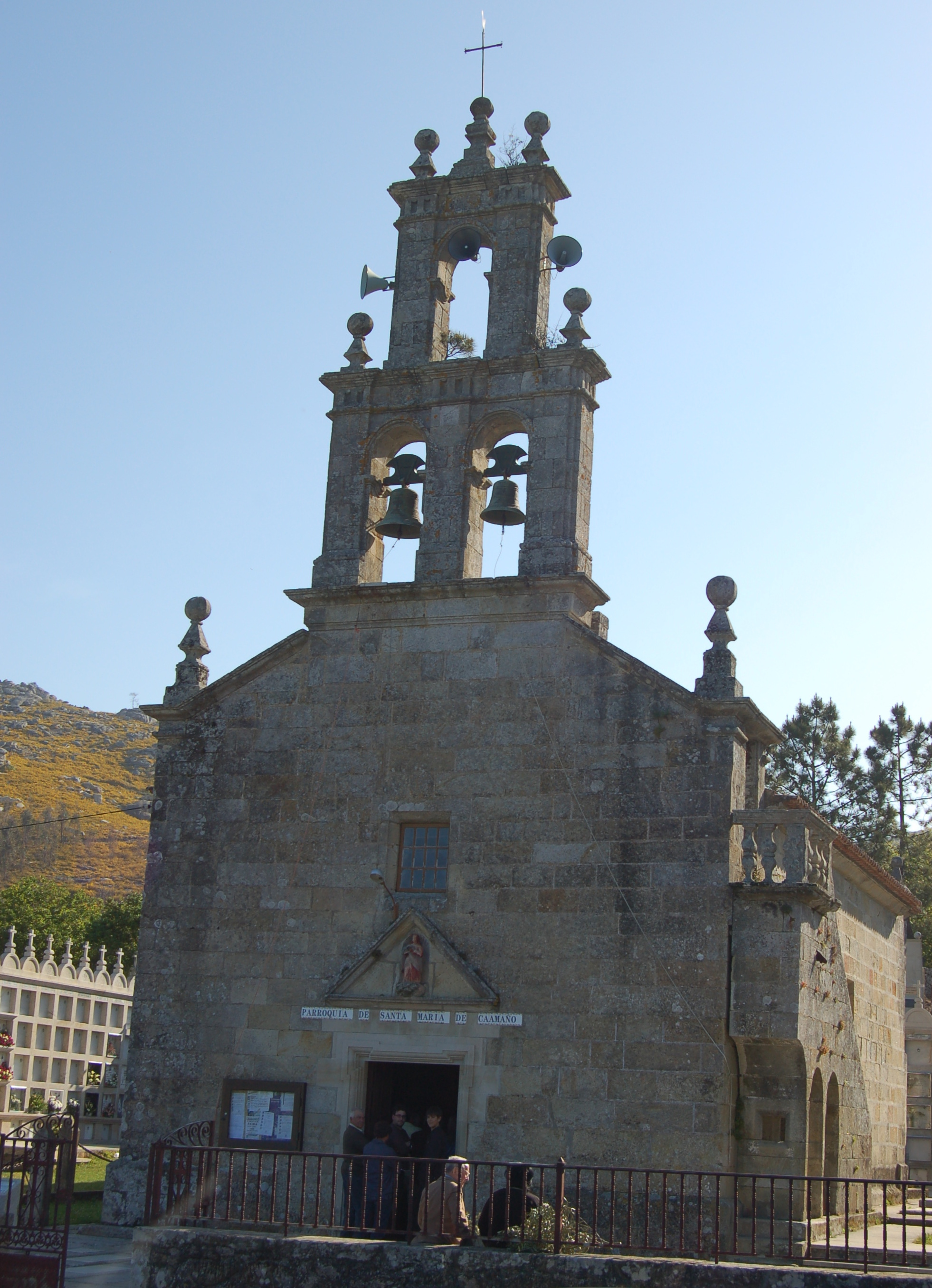 Igrexa parroquial de Caamaño (Porto do Son).